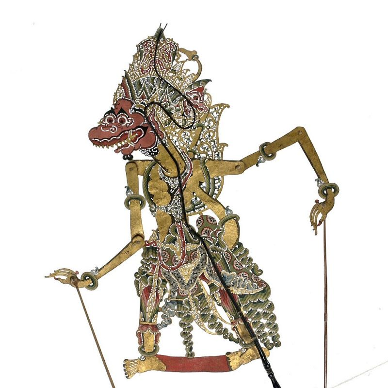 Schaduwfiguur. Wajangpop, voorstellende Sugriwa Unknown language: Wayang kulit purwa